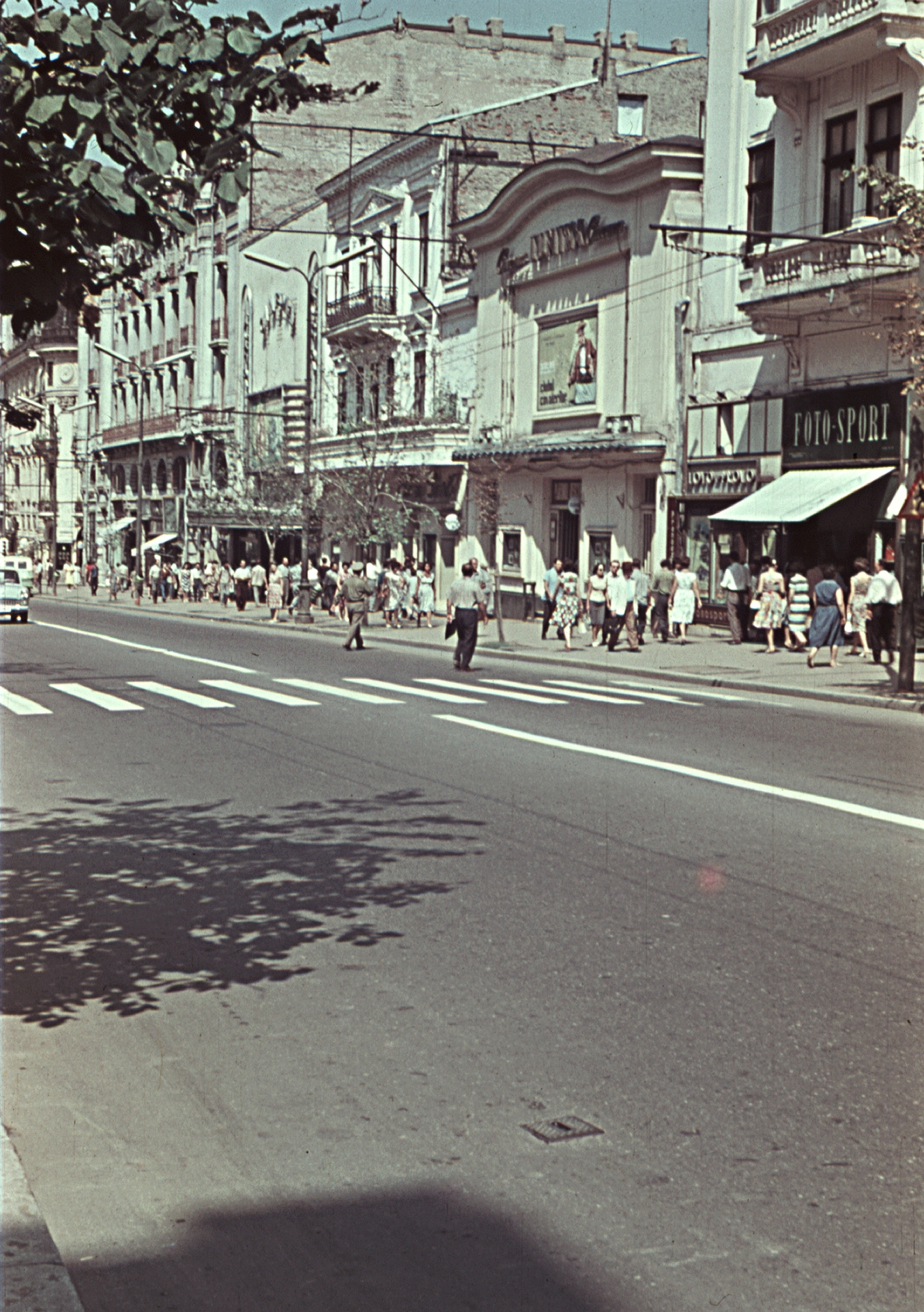 Bulevardul Regina Elisabeta Location: Romania, Bucharest Tags: colorful, street view, crosswalk Title: Bulevardul Regina Elisabeta